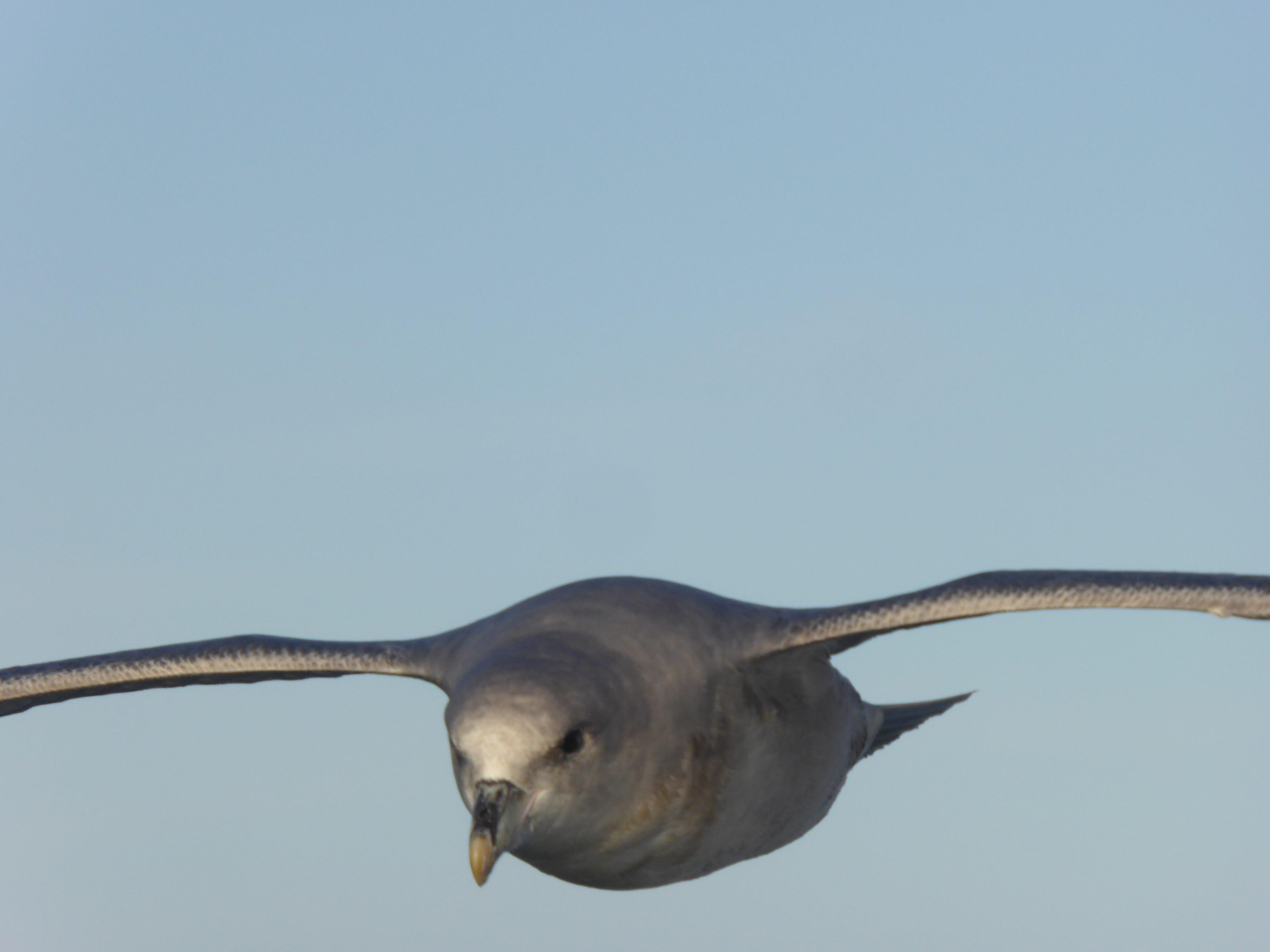 Eissturmvogel vor Spitzbergen